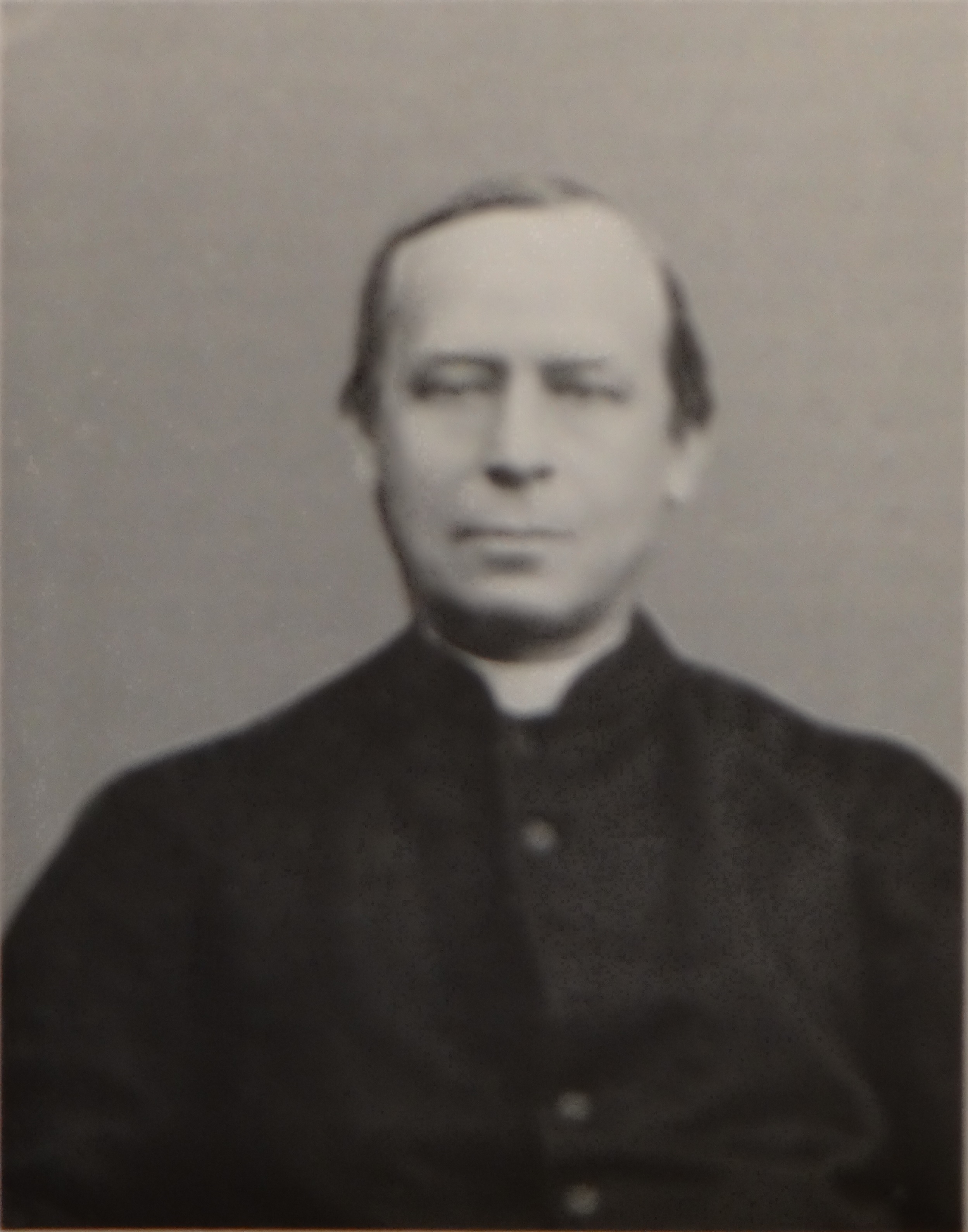 Dr. theol. Franz Düsterwald, erster Direktor des Collegium Albertinum in Bonn